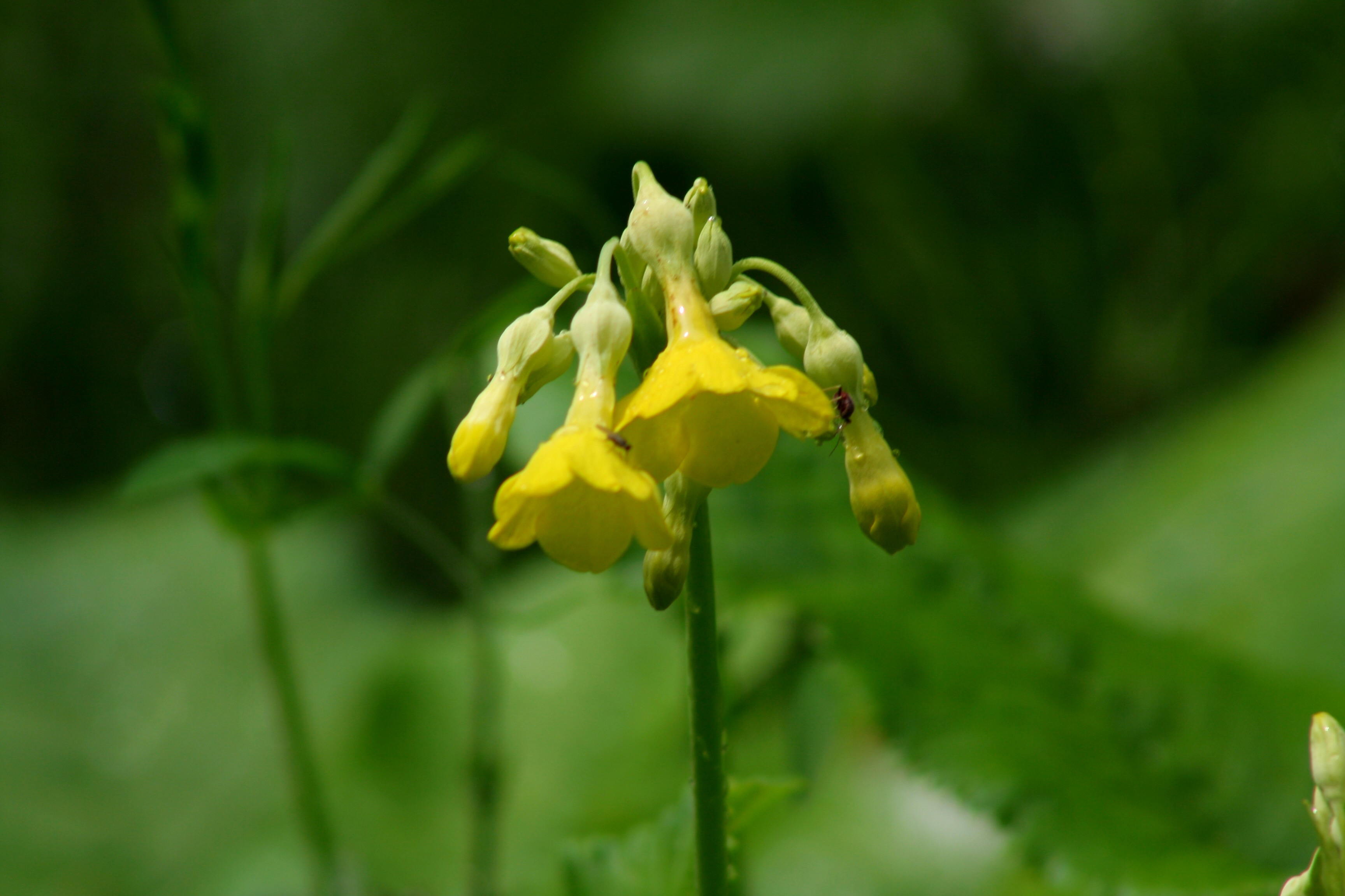 Primula_elatior (Primula maggiore) Giardino Botanico Villa Welsperg, Val Canali, Tonadico(TN), 1038 m s.l.m.